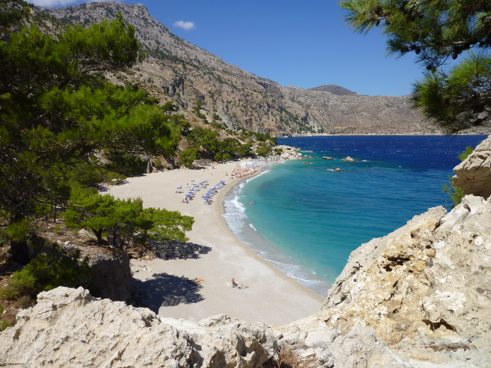 die Apella-Bucht im Osten der Insel Karpathos; Griechenland. Die Bucht ist per Ausflugsboot und über die Straße erreichbar, sowie über einen Wanderweg.